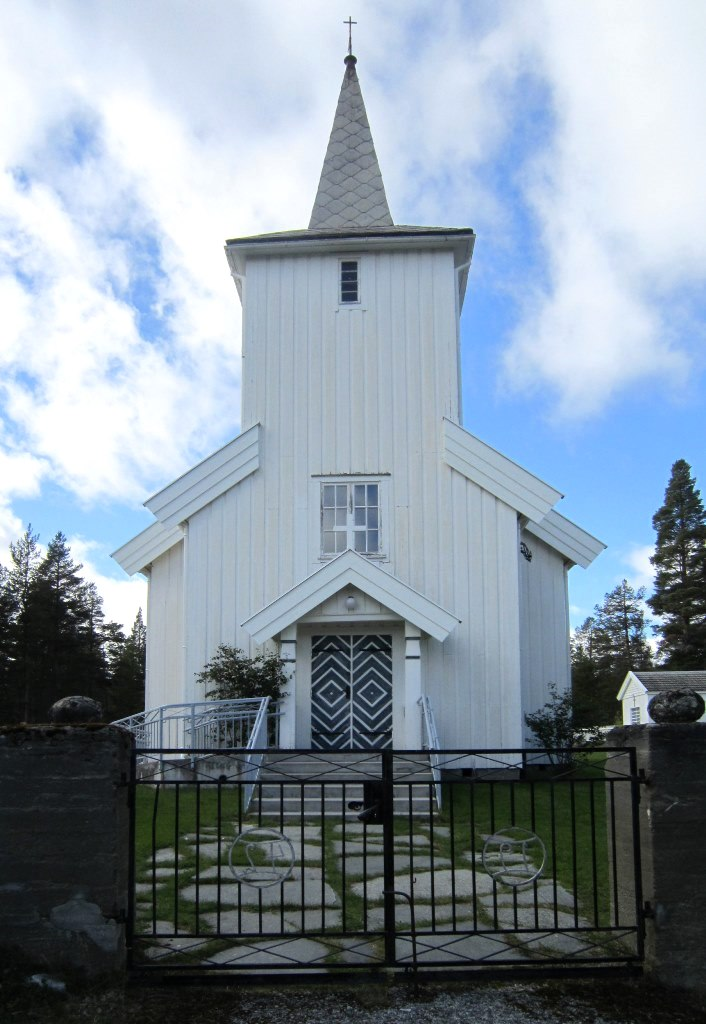 Tunhovd kirke, Buskerud